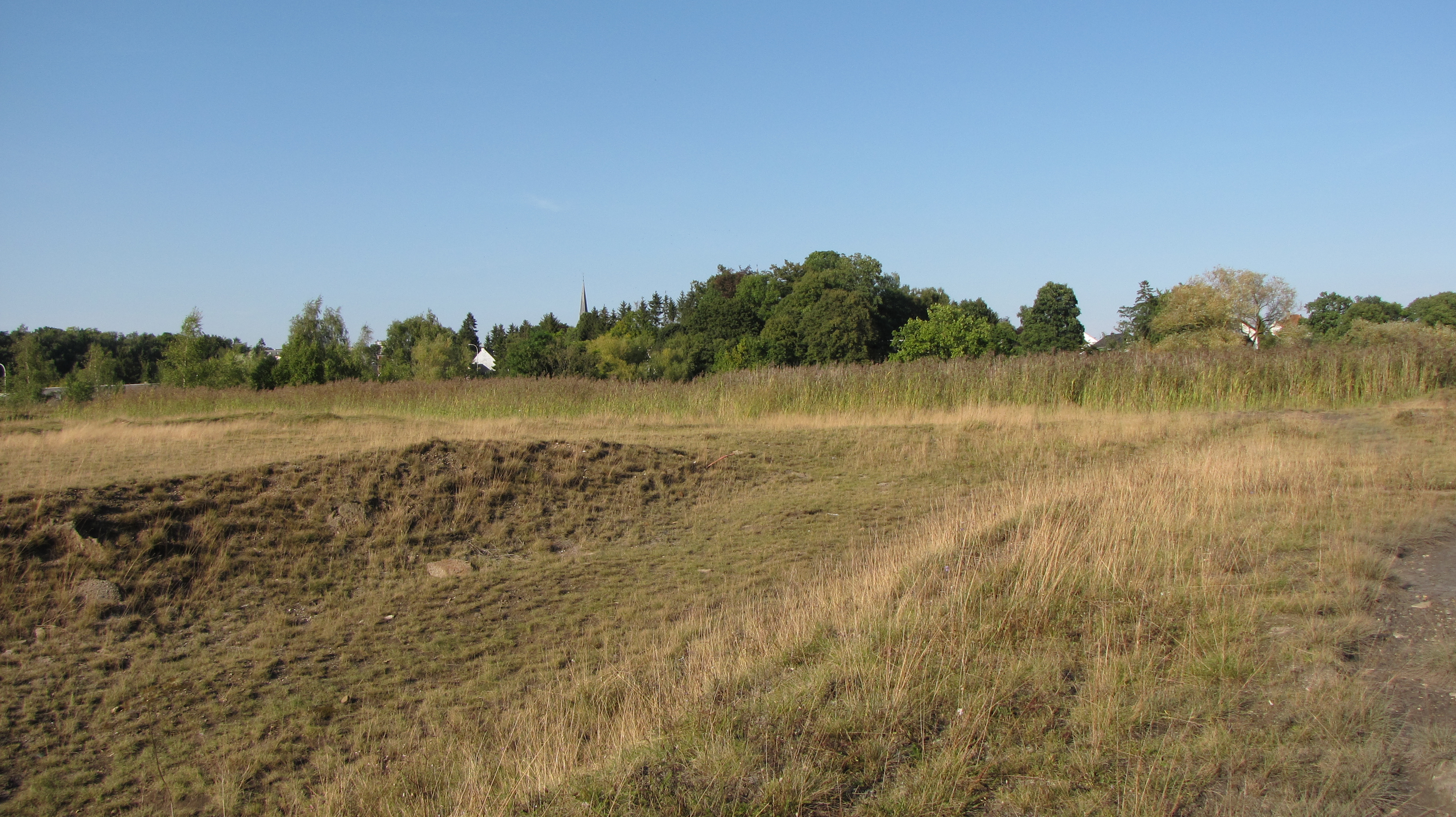 La Calamine – la halde est constituée par des remblais de déchets d’exploitation des minerais de zinc. Elle est classée comme réserve naturelle depuis 2006 et site de grande valeur biologique (SGIB).